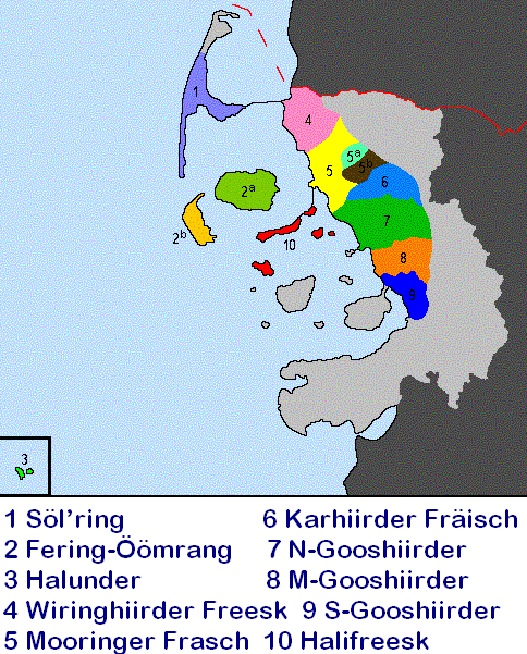 Nordfriisk: Nordfriisk Koord